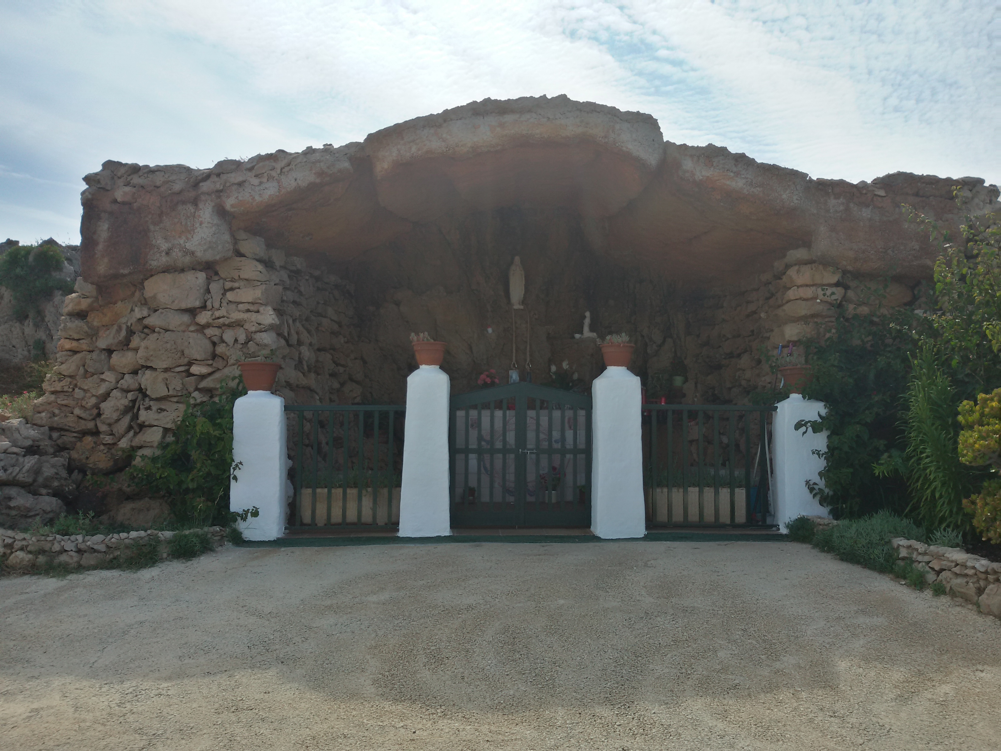 Ermita de Lourdes (Fornells)